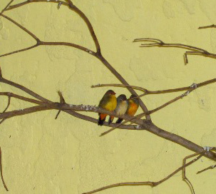 Species Amandava subflava Family Estrildidae